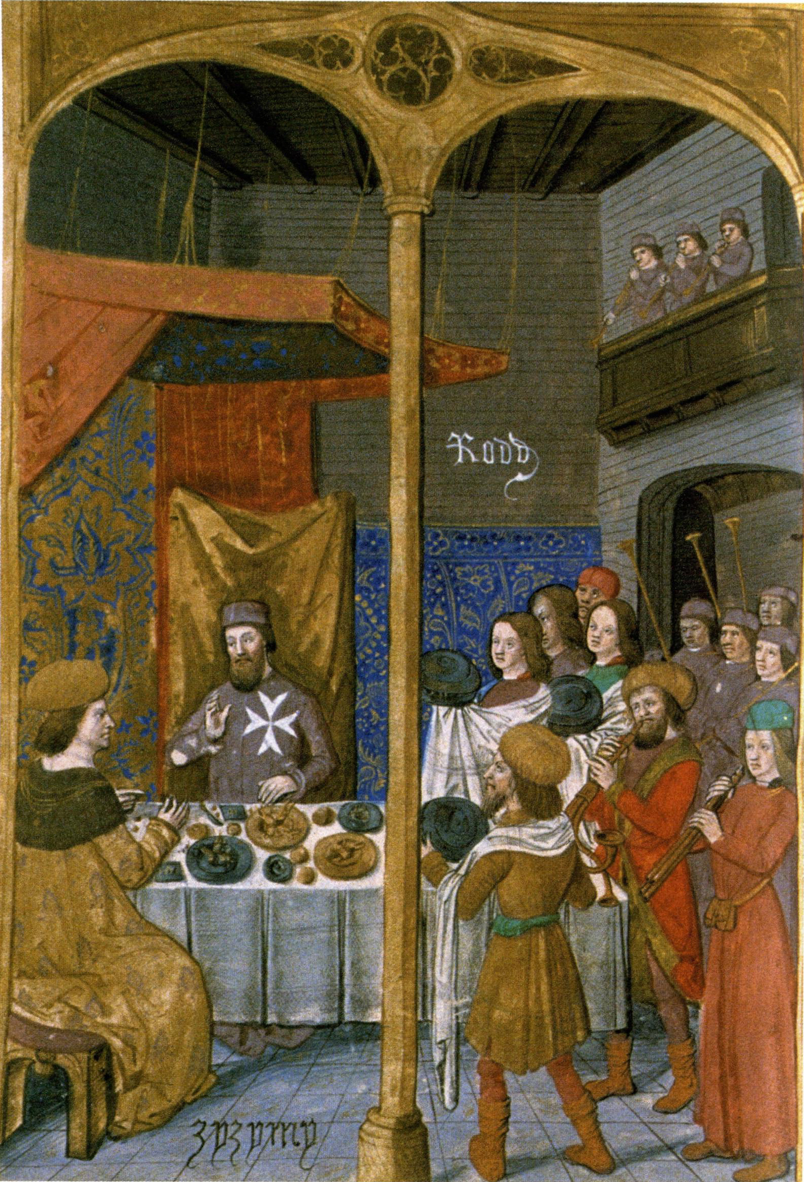 Cem Sultan bei Pierre d’Aubusson, dem Großmeister des Johanniterordens.